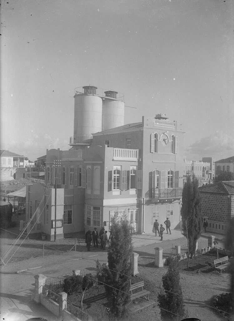 בית הוועד